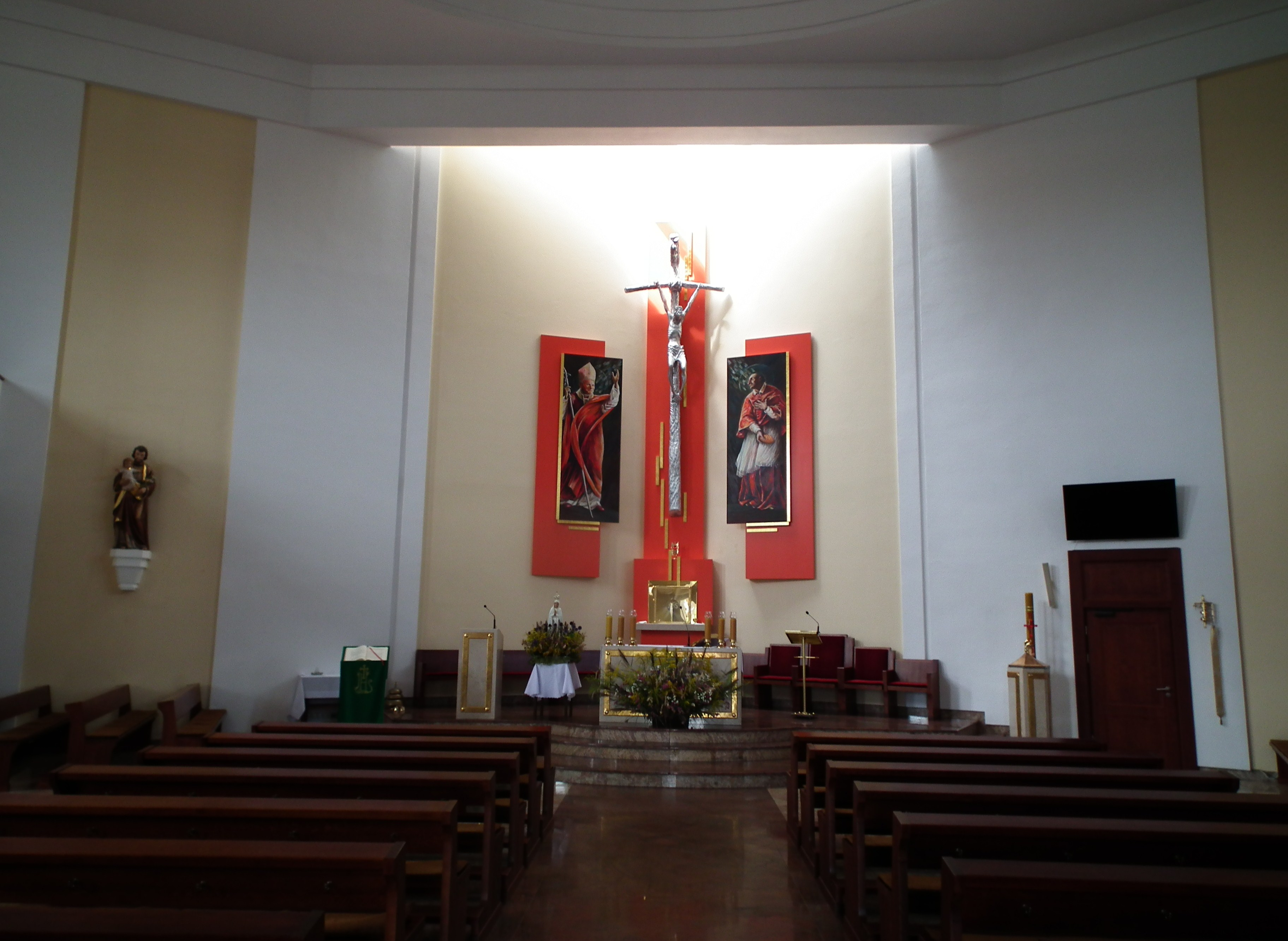 Kościół św. Karola Boromeusza w Poznaniu - Winogrady.